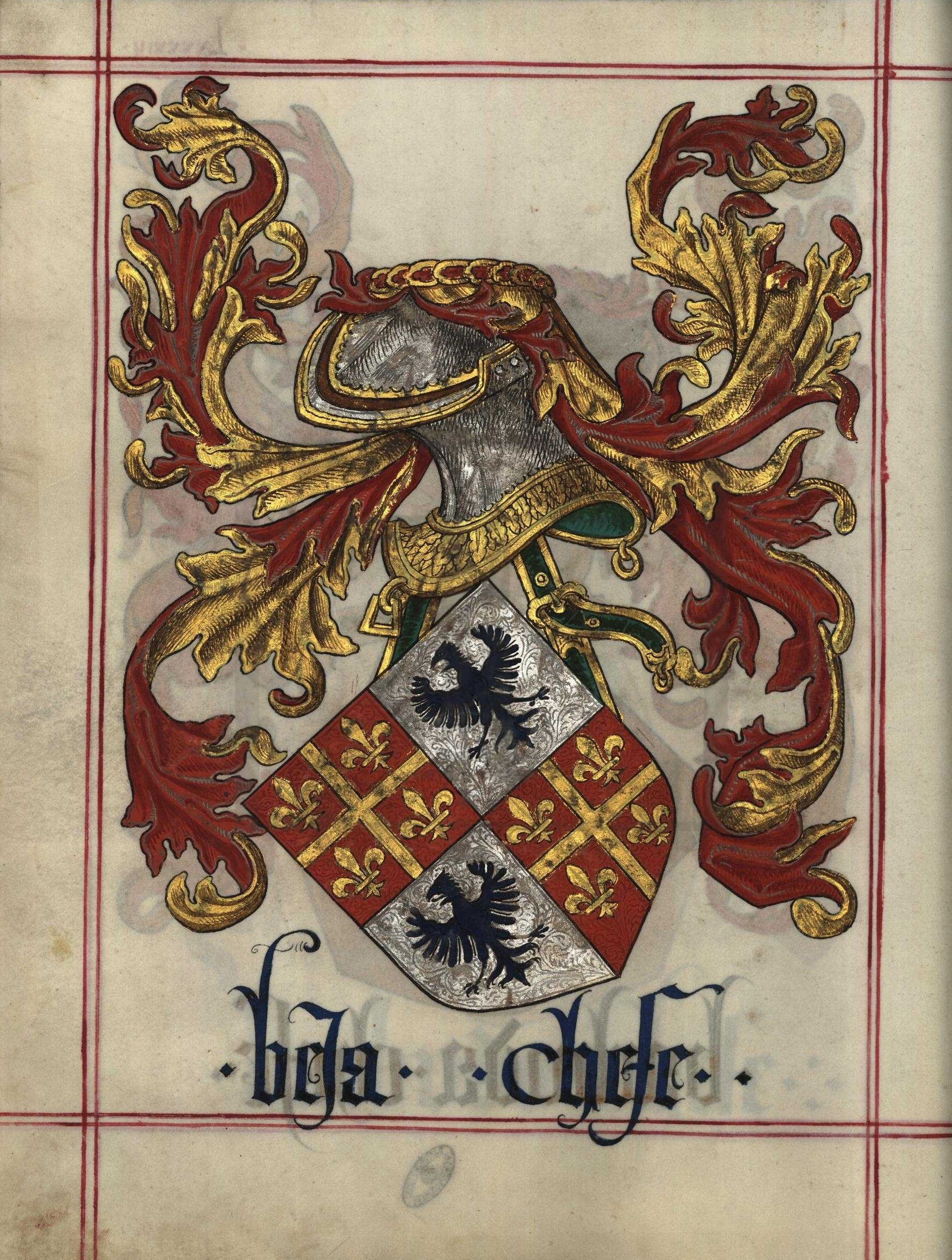 Livro do Armeiro-Mor, Beja (fl 93v)